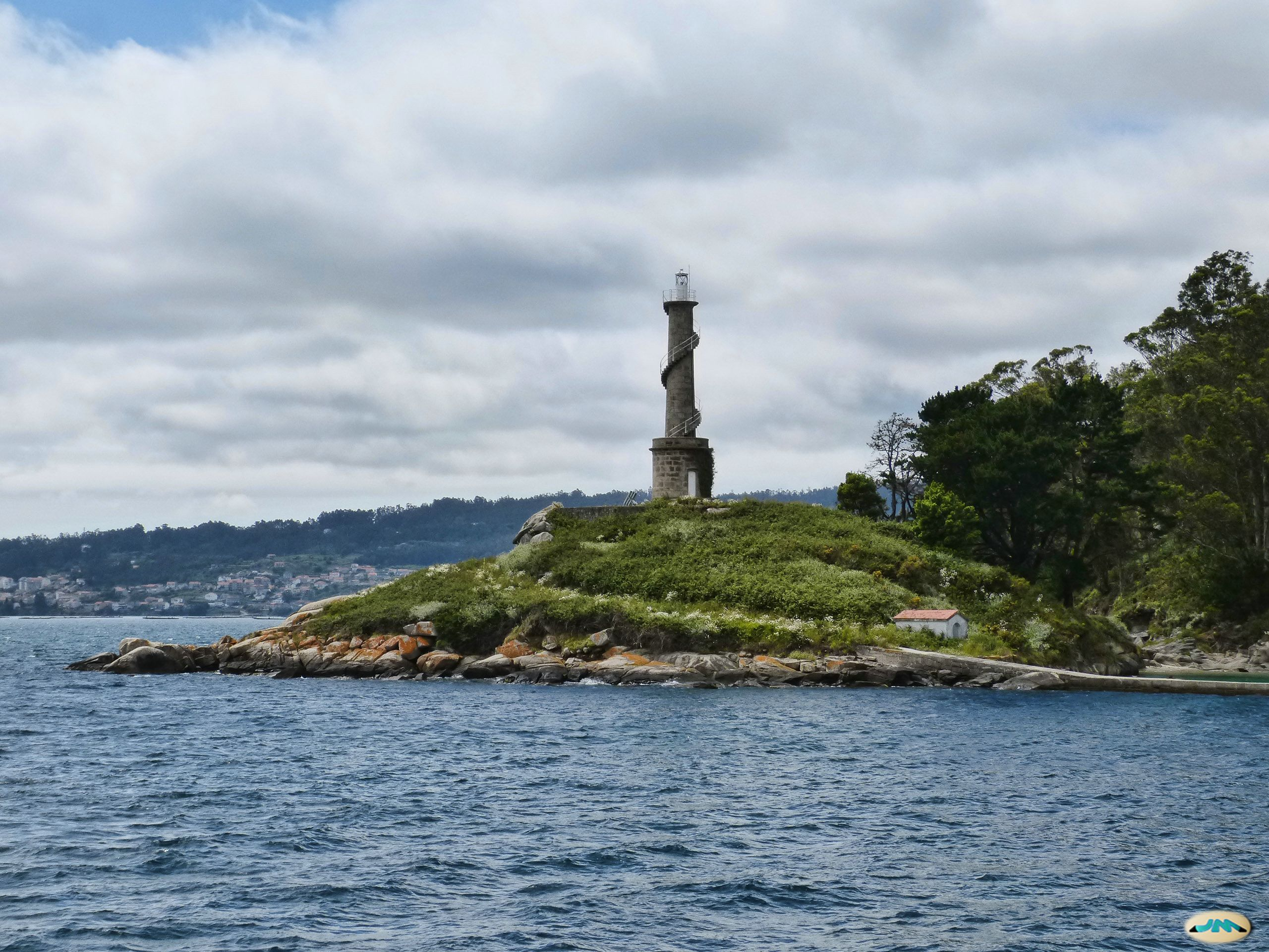 Faro da Illa de Tambo.